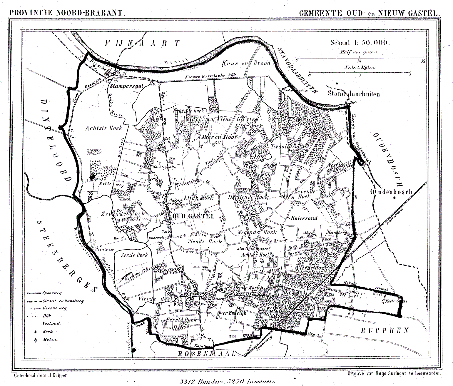 Nederland, Noord-Brabant, Gemeente Gastel